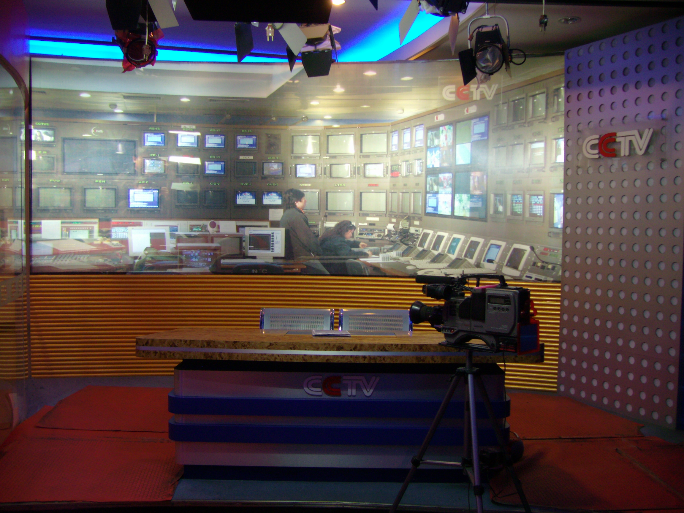 中文（中国大陆）: 中央电视塔内于2003年启用的中国中央电视台《新闻联播》演播室（仿制布景，并非彩电中心内的演播室实景）。